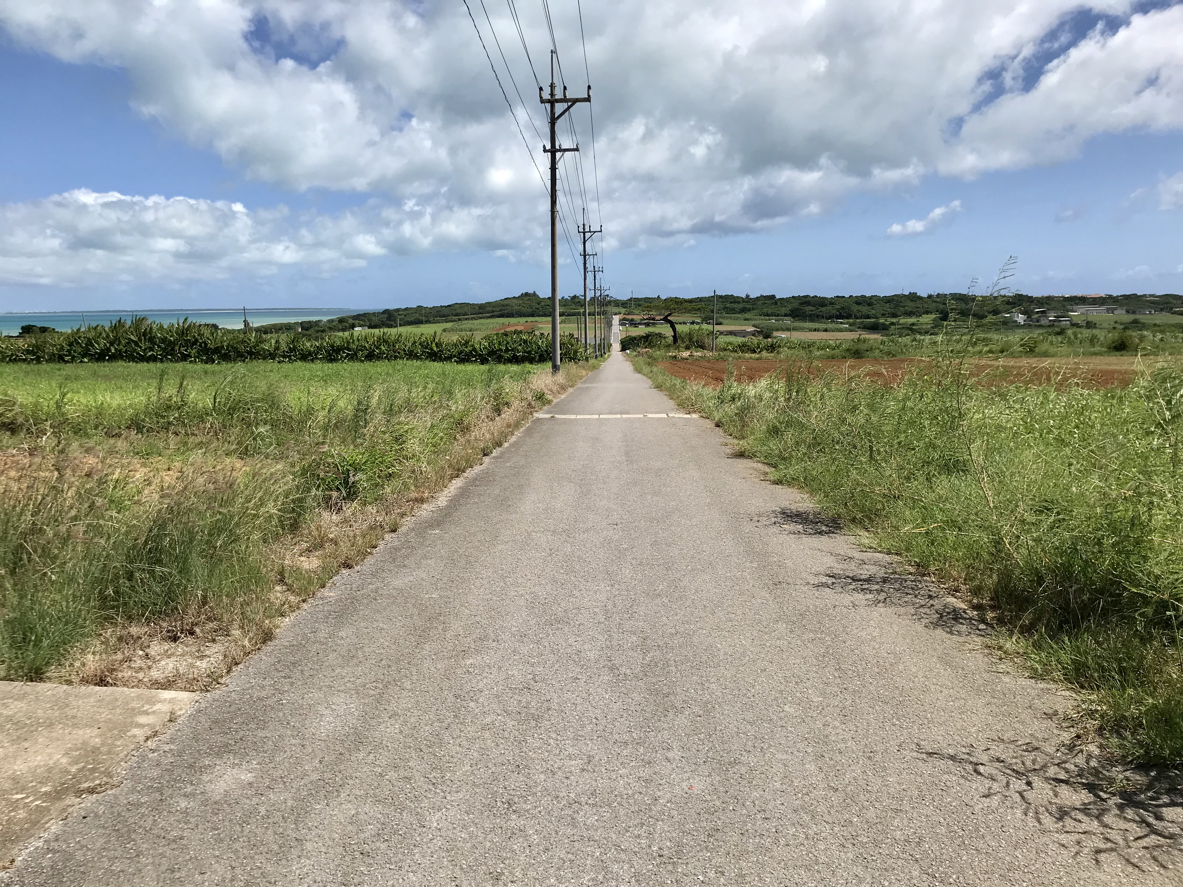 沖縄県小浜島にある連続テレビ小説『ちゅらさん』のロケ地通称「シュガーロード」